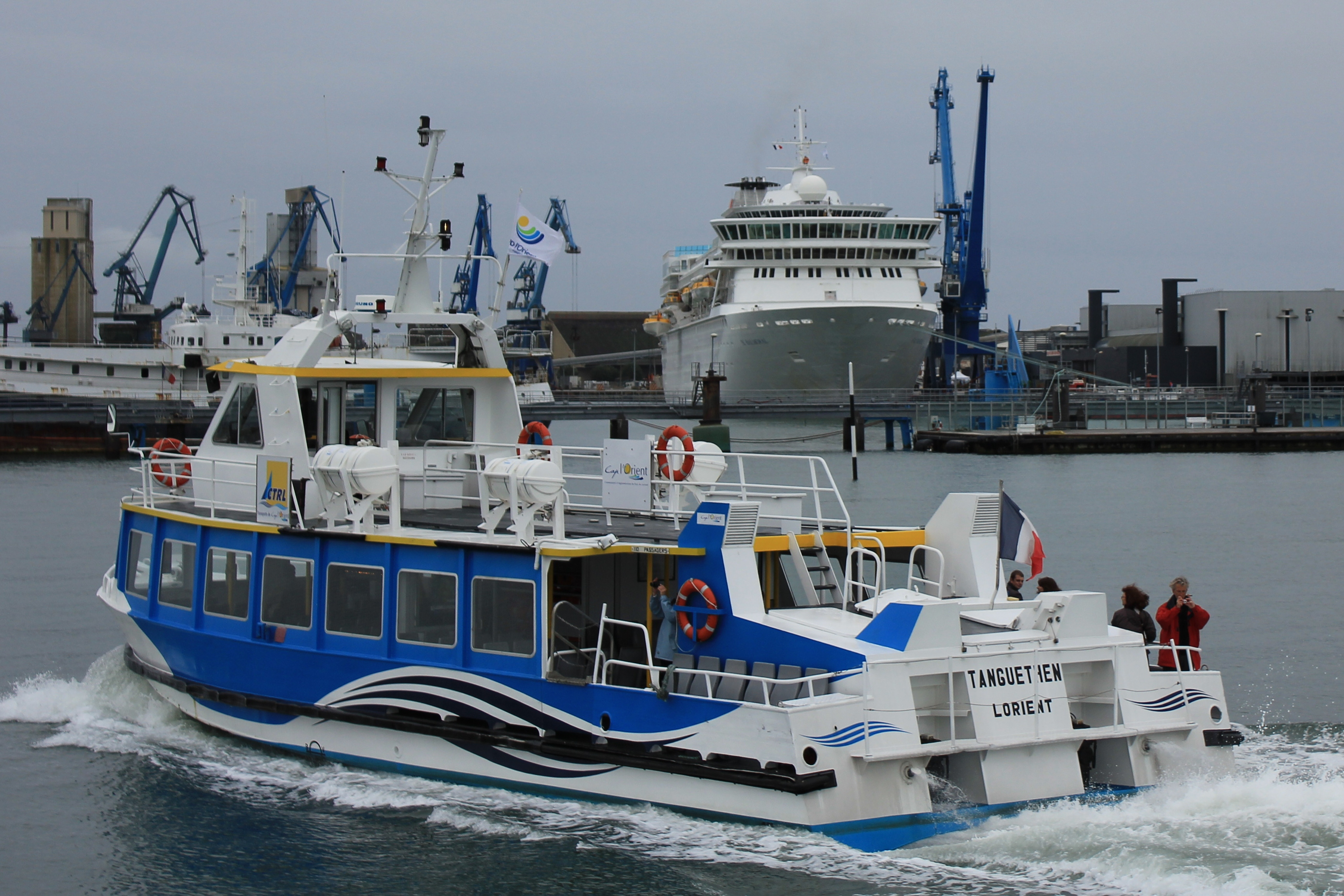 Le Balmoral et le Tanguethen, un transrade de la CTRL